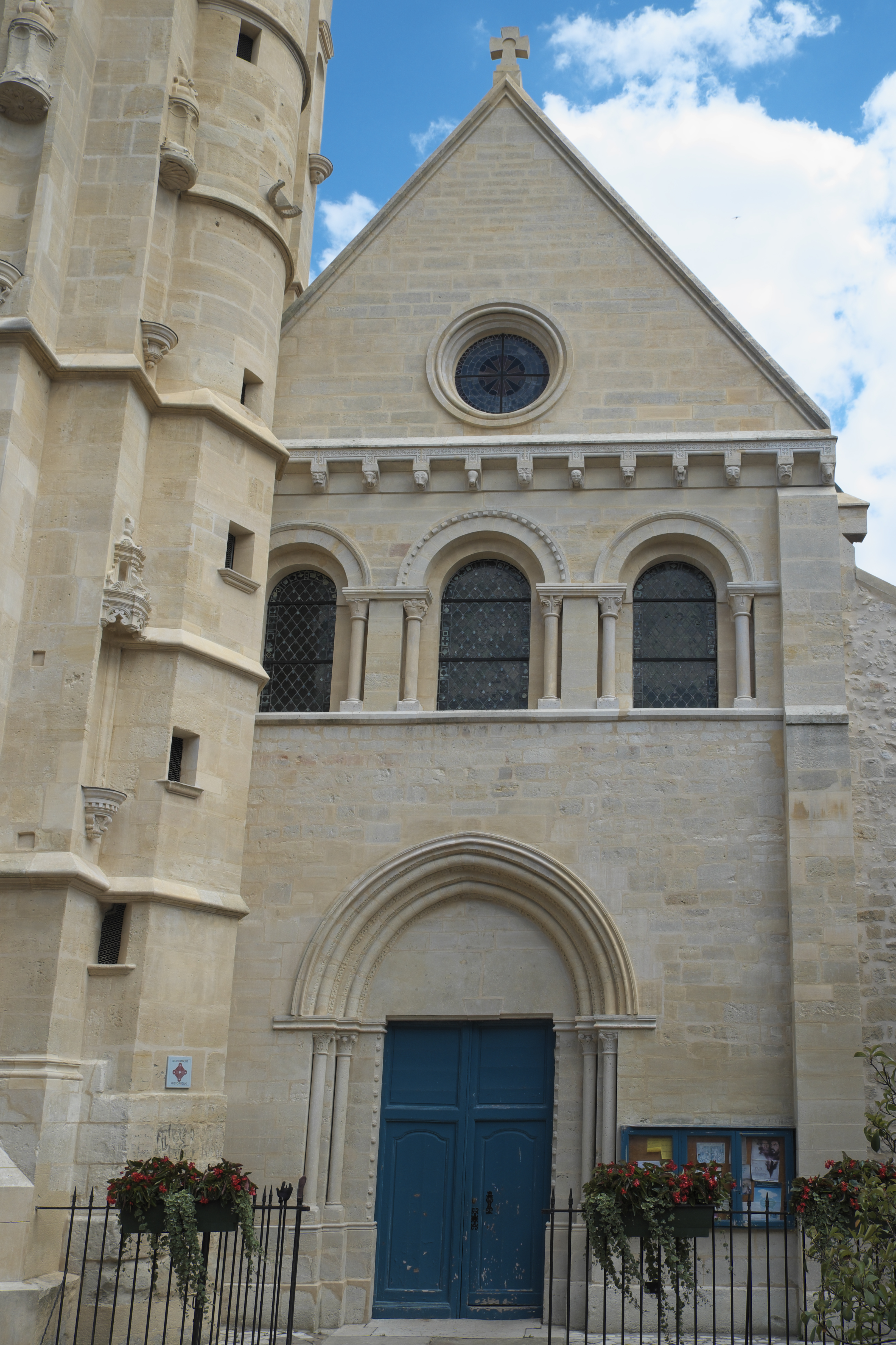 Katholische Kirche Saint-Nicolas in Maule im Département Yvelines (Île-de-France/Frankreich), Portalfassade